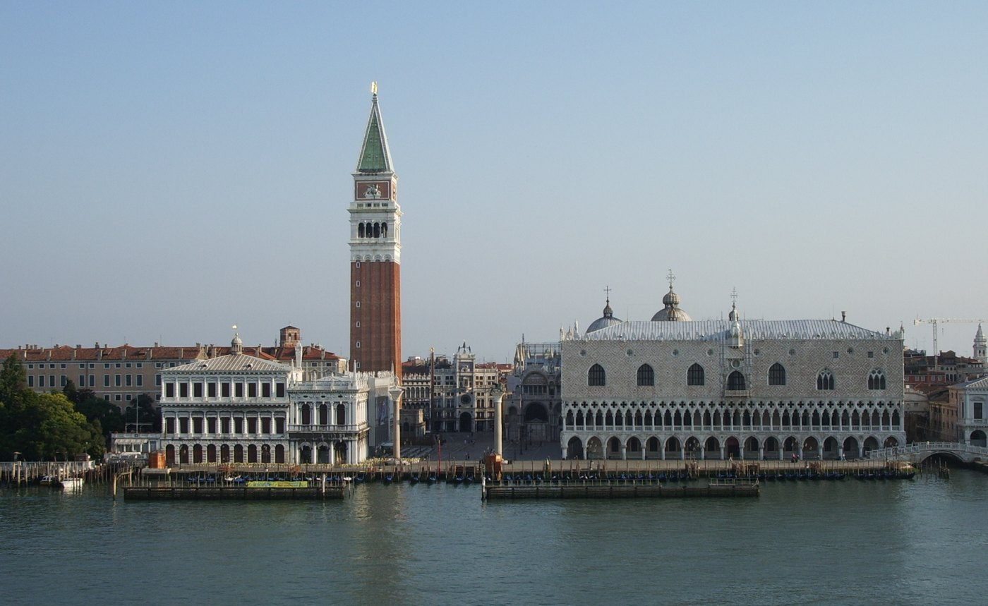 Dogenpalast und Campanile von der Lagune aus